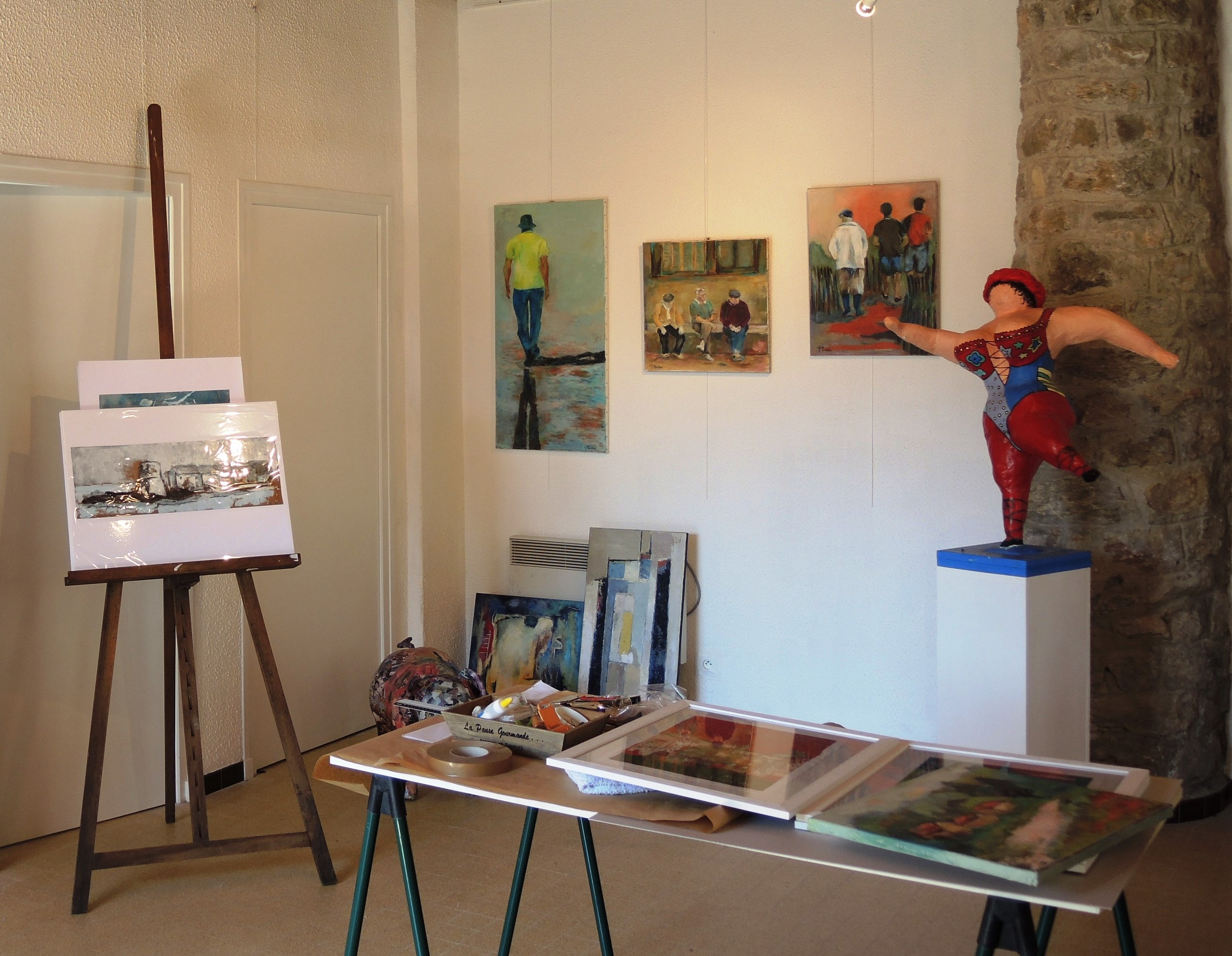 St-Symphorien de Mahun Geneviève Ponchon atelier